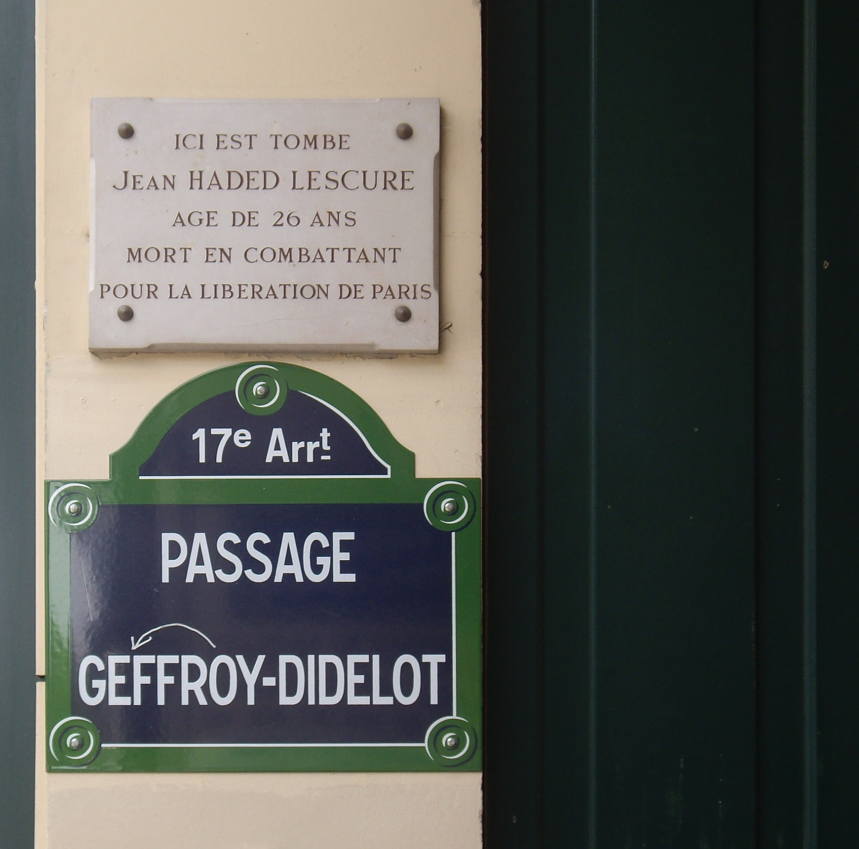 Plaque apposée à l'entrée du passage Geffroy-Didelot au n° 92 du boulevard des Batignolles, Paris 17e.« Ici est tombé Jean Haded Lescure, âgé de 26 ans, mort en combattant pour la libération de Paris. »Sous-lieutenant des FFI, né le 14 octobre 1918, mort le 23 août 1944 sous les tirs d'un char allemand.